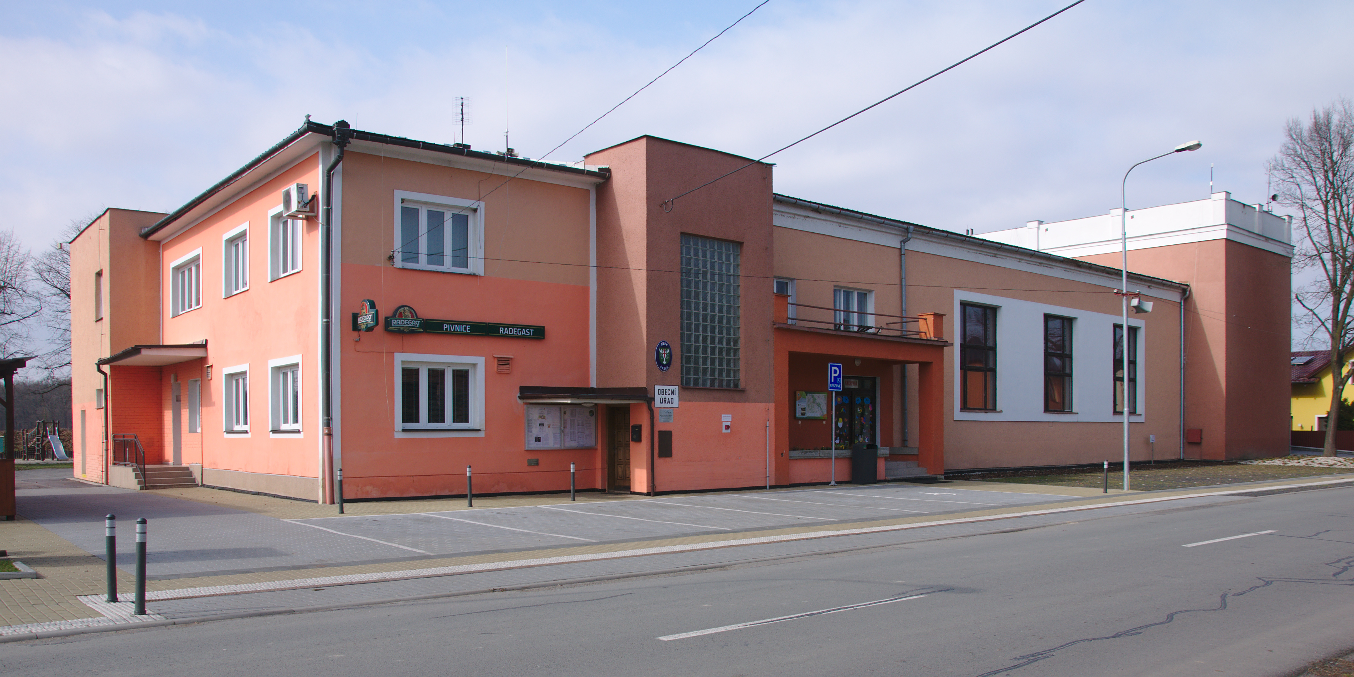 Obecní úřad, Střeň, okres Olomouc